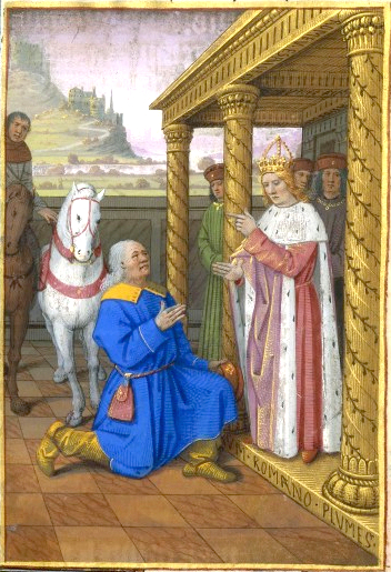 Antiquités judaïques, Flavius Josèphe, traduction anonyme, vers 1470, Nouvelle acquisition française 21013, f65 Auguste nommant Quirinus gouverneur de Syrie